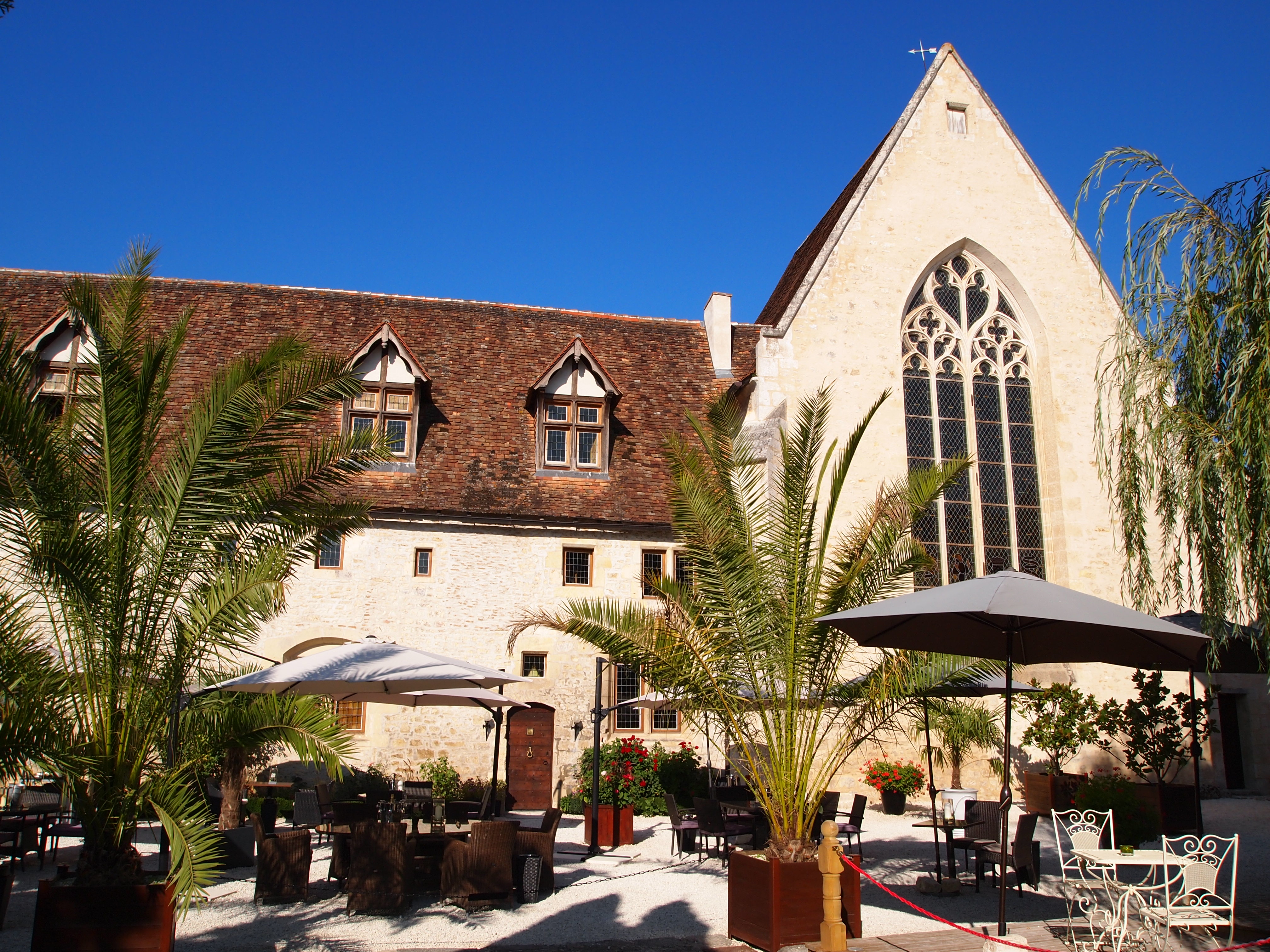 Couvent des Cordeliers de Verteuil-sur-Charente , (inscrit, 2009)